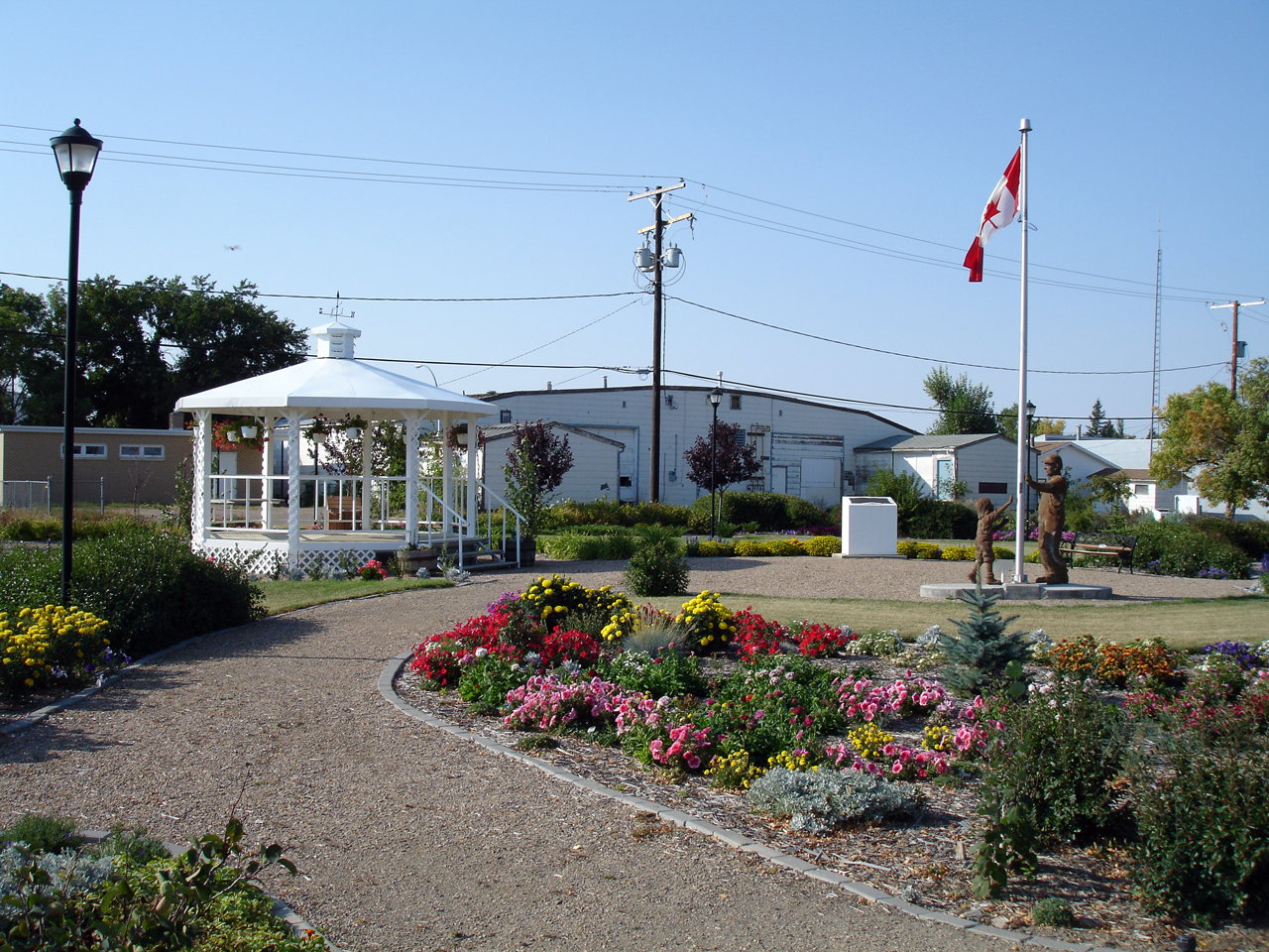 Millennium Gardens in Leader, Saskatchewan, Canada.